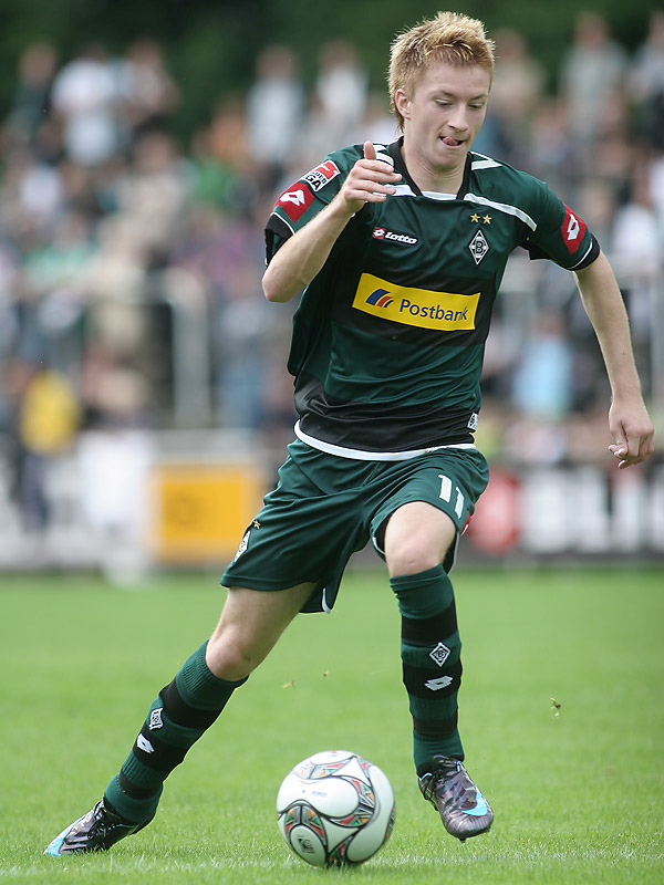 Marco Reus - Mittelfeldspieler von Borussia Mönchengladbach